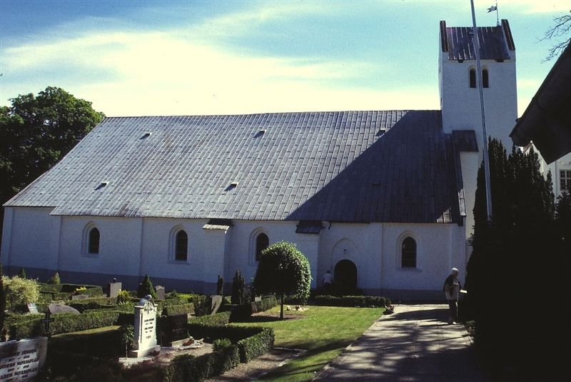 Øland Kirke i Danmark. Øland kirke